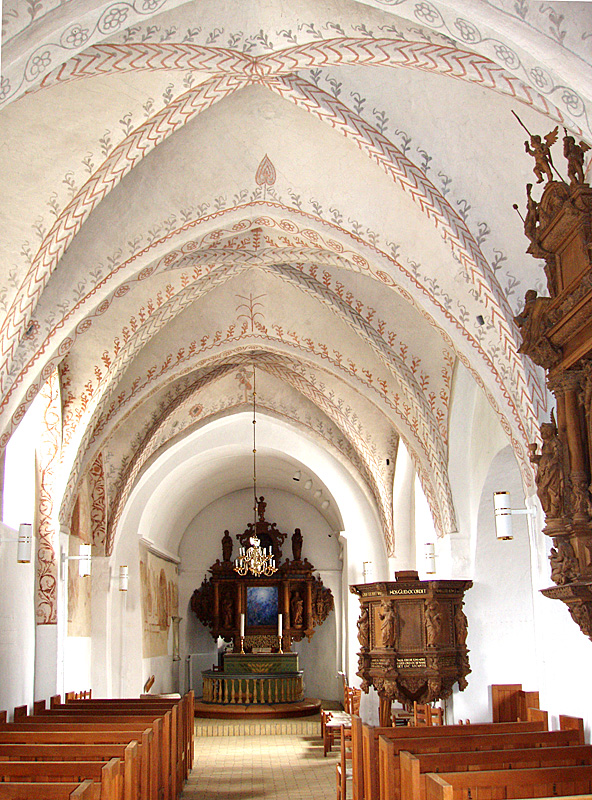 KIrkerummet Skanderup Kirke , Skanderborg, Hjelmslev Herred, .Århus Amt (tidligere Skanderborg Amt)